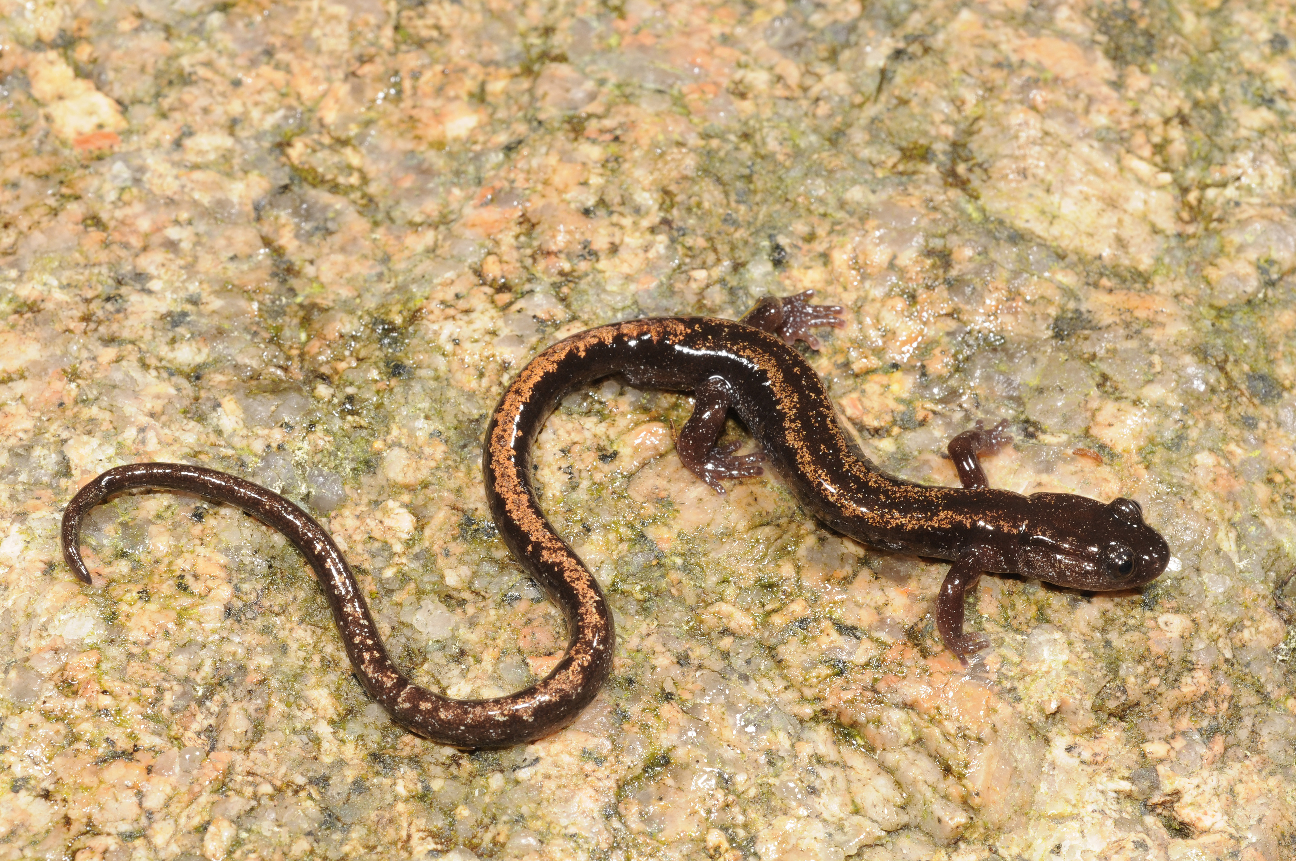 Goldstreifen-Salamander aus dem Grenzbereich von Nordportugal zu Spanien